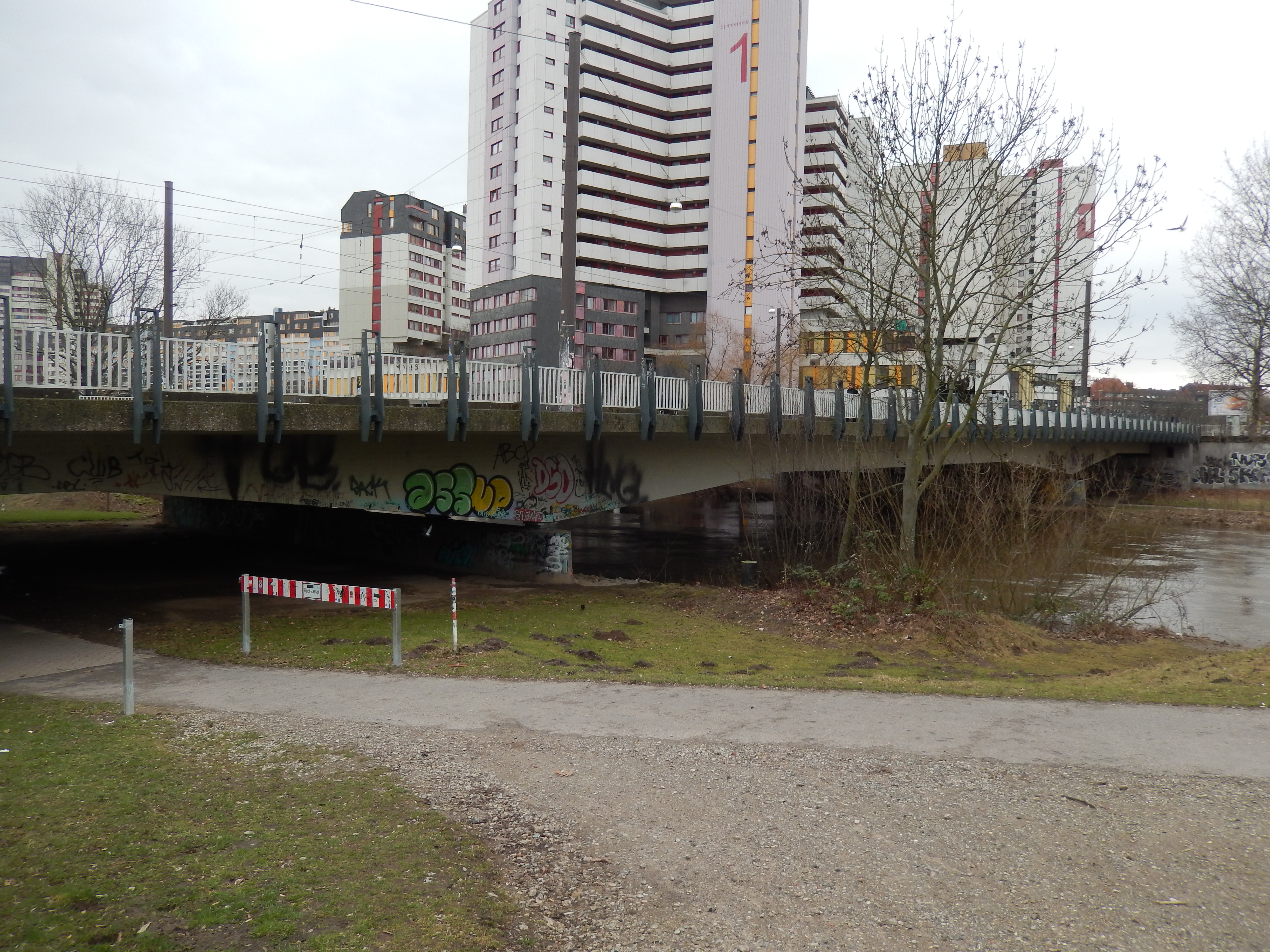 Leinertbrücke in Hannover